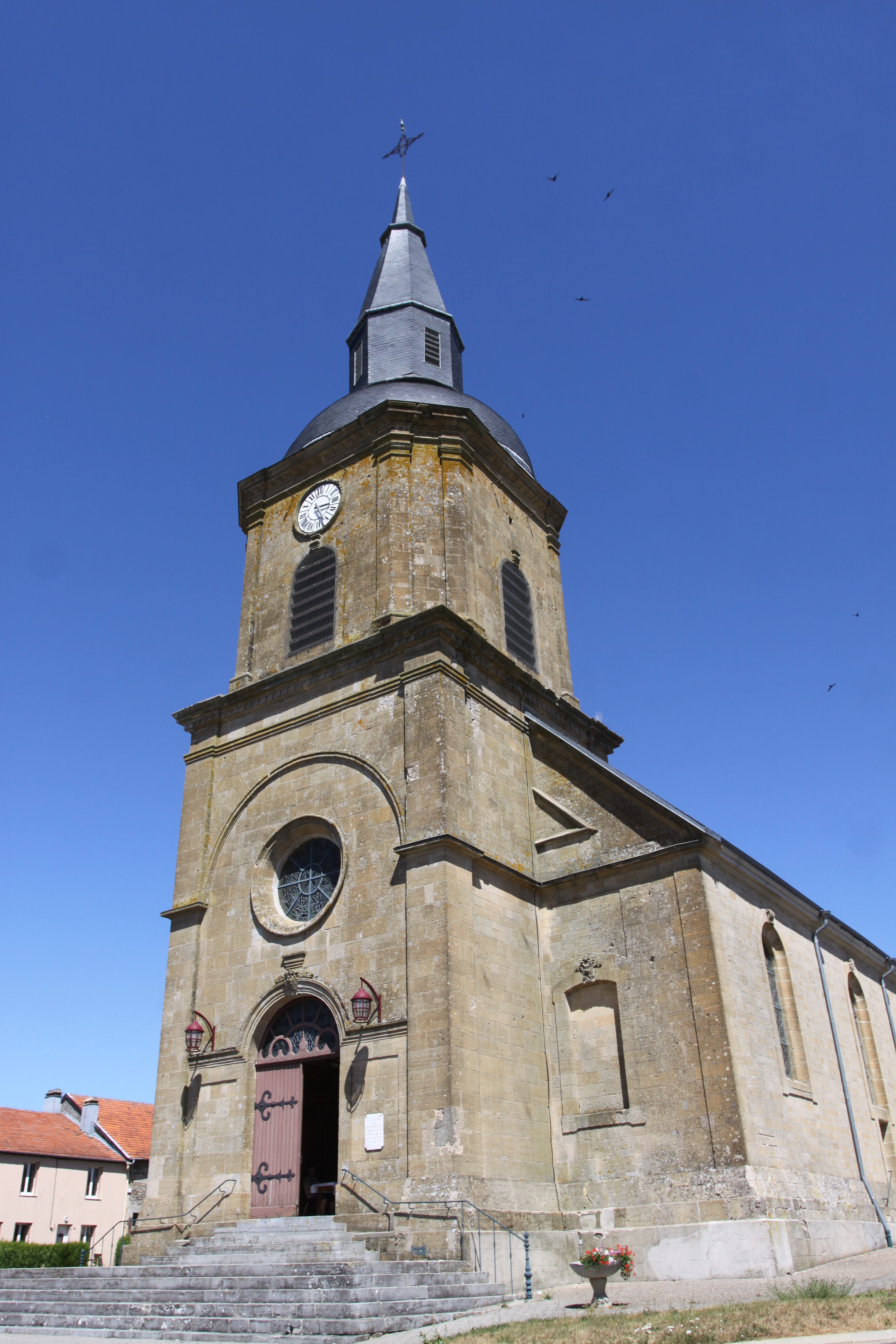 Village Ardennais